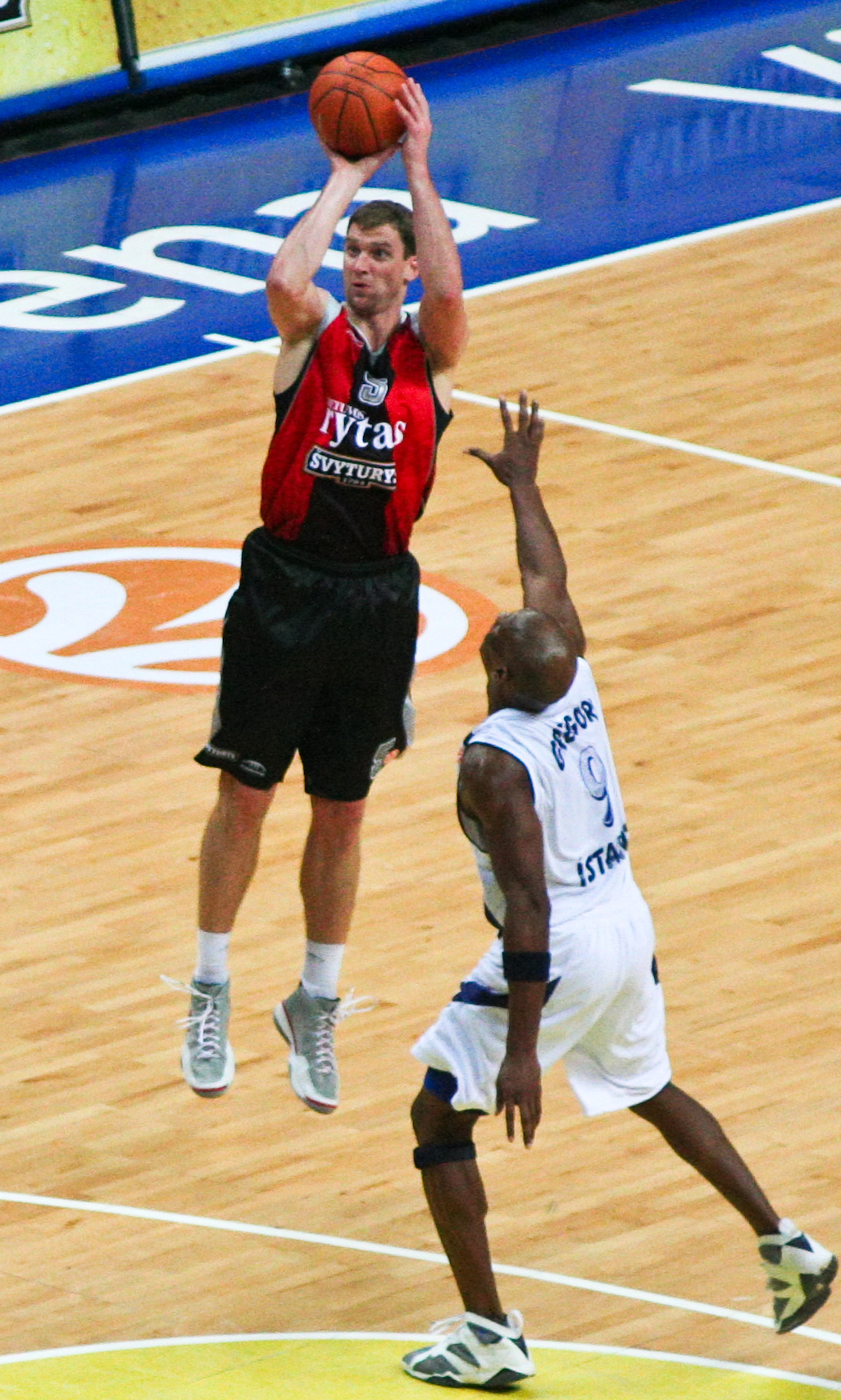 Andrius Šležas in action during BC Lietuvos Rytas Vilnius home game against BC Efes Pilsen Istanbul in Siemens Arena, Lithuania